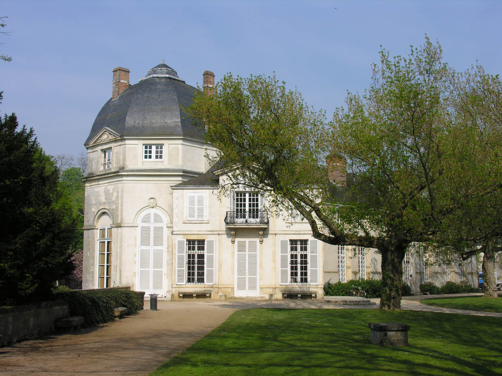 Château de Châteauneuf-sur-Loire, Loiret, France. Actuelle mairie.